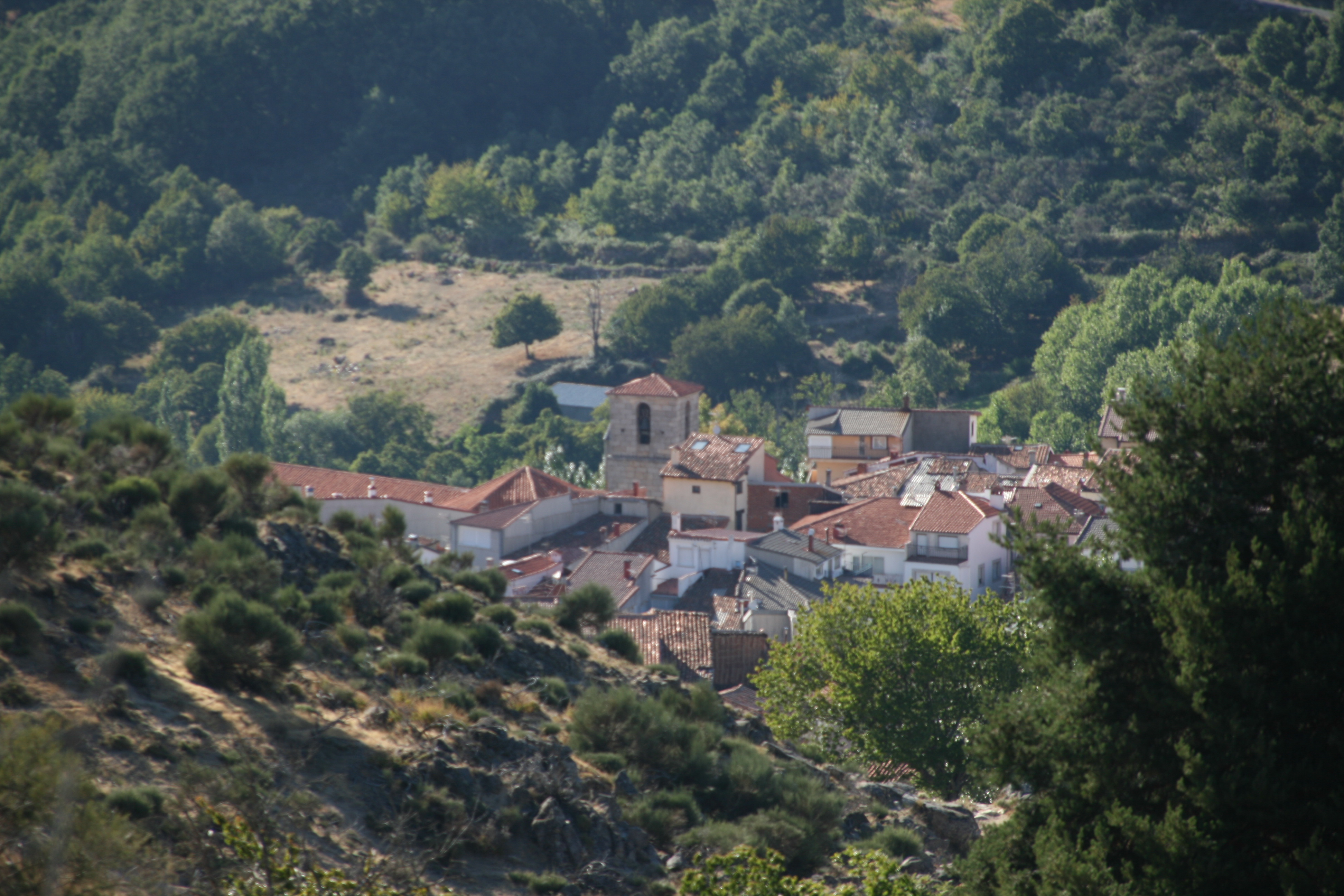 Vista de La Garganta desde la carretera de Hervás a Candelario